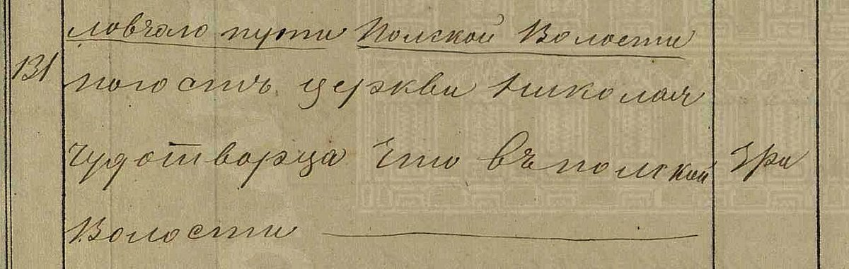 РГАДА, ф.1209, оп.73і, с.524 - Польская волость Ловчего пути